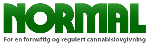 Den nye logoen til Normal